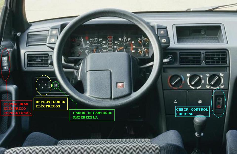 Citroën BX